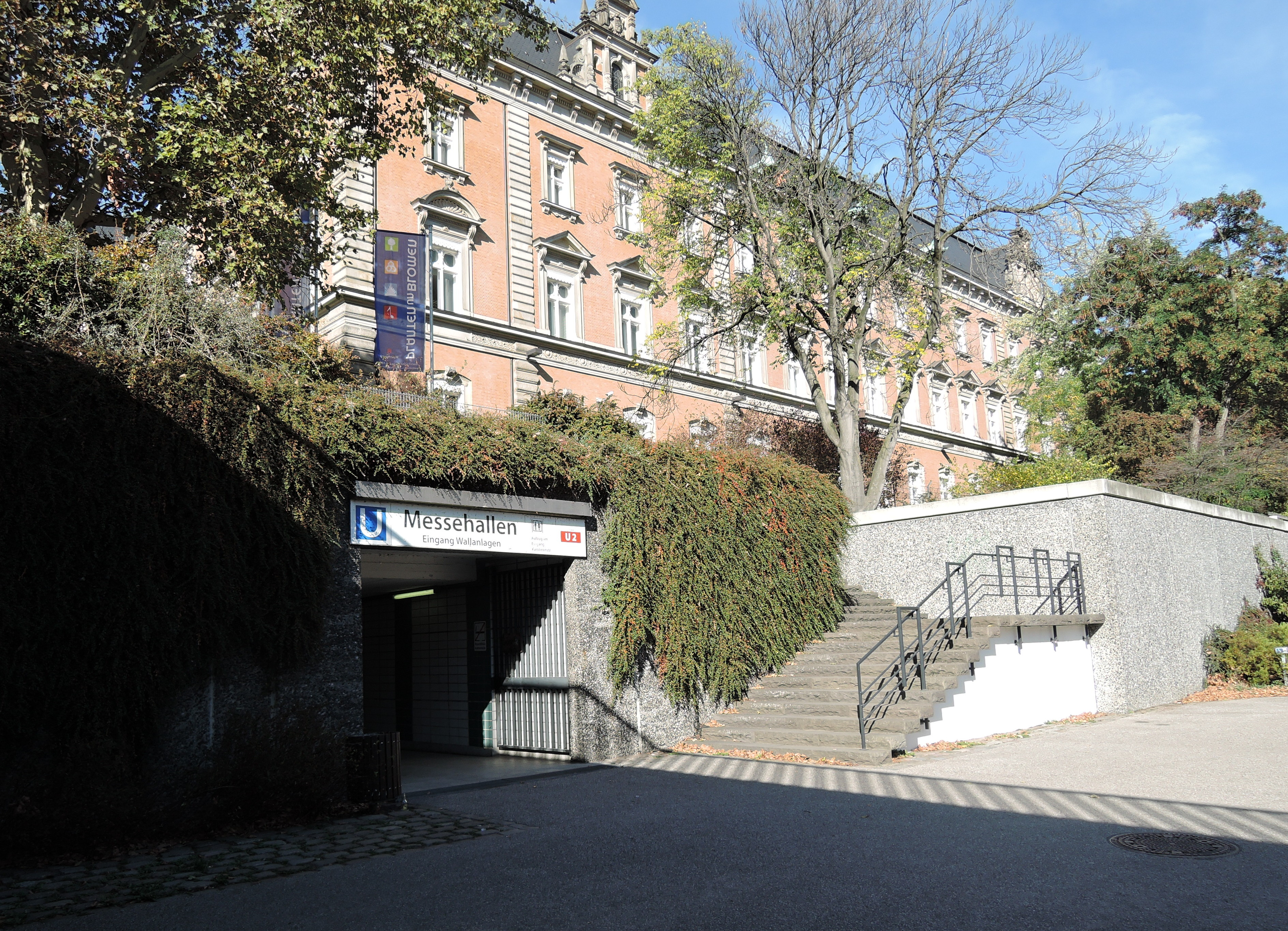 U-Bahn Station Messehallen, Eingang + Ausgang im Planten und Blomen